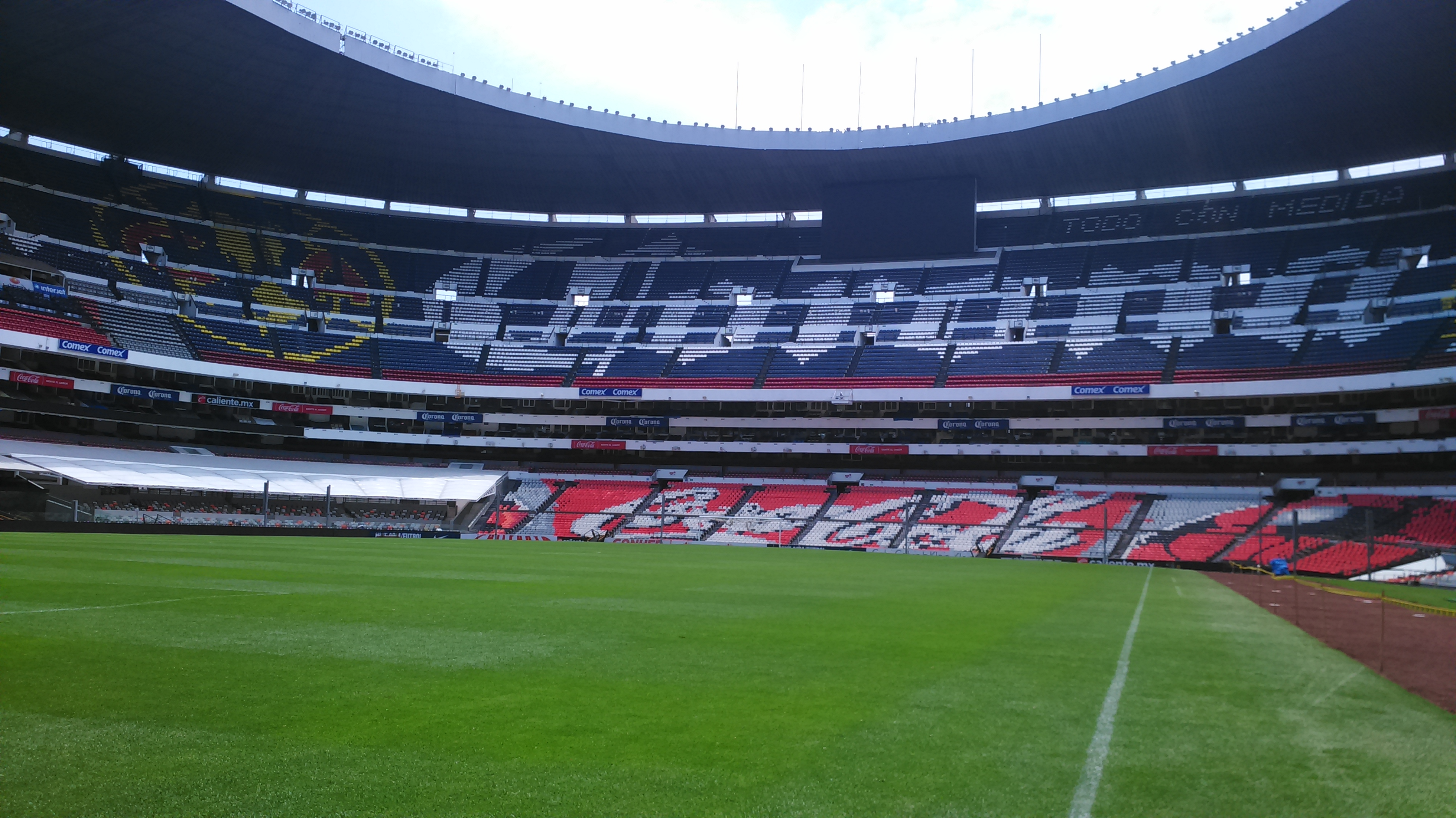 Vista de la cancha y la tribuna sur